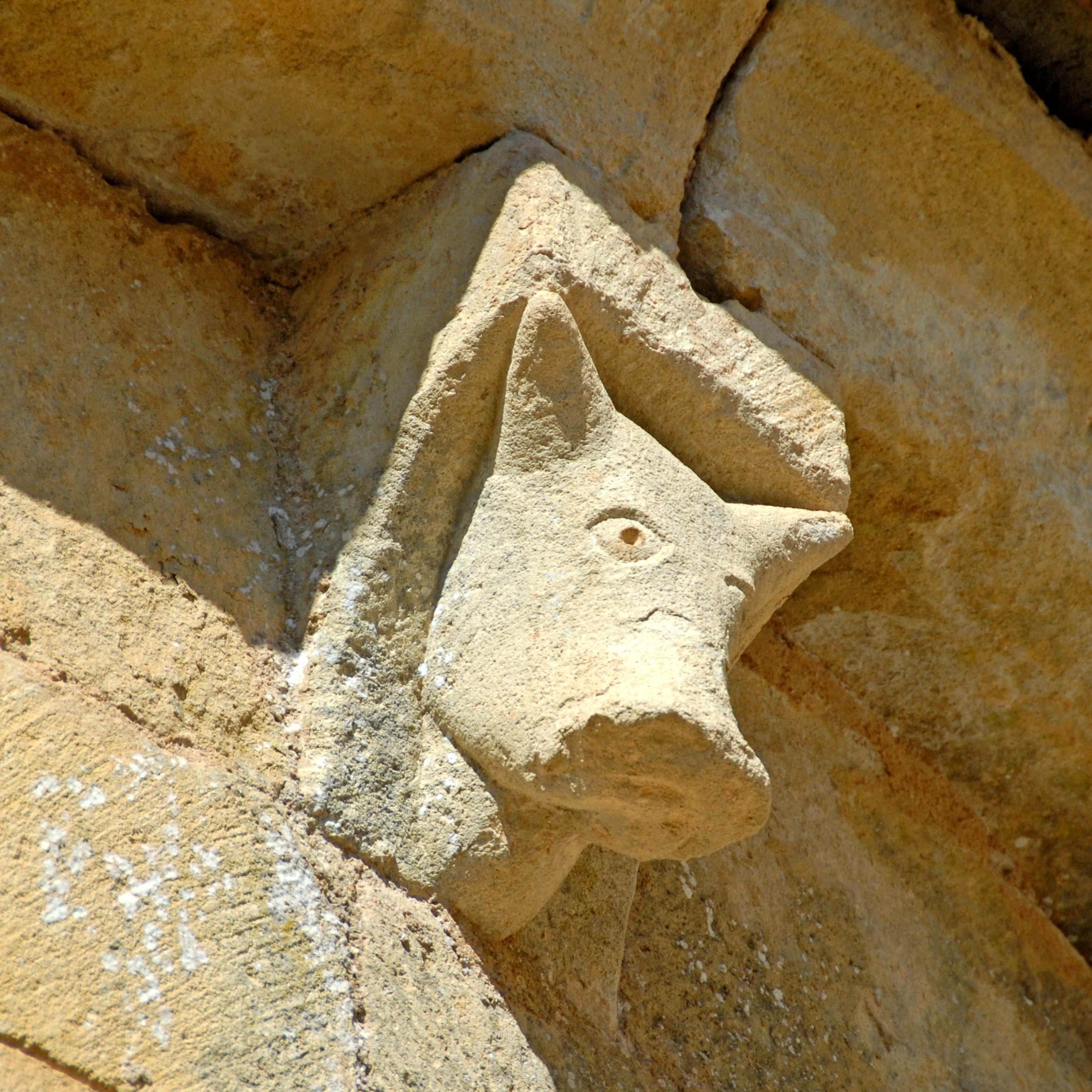 Cadouin, Kragstein Traufgesims, Detail